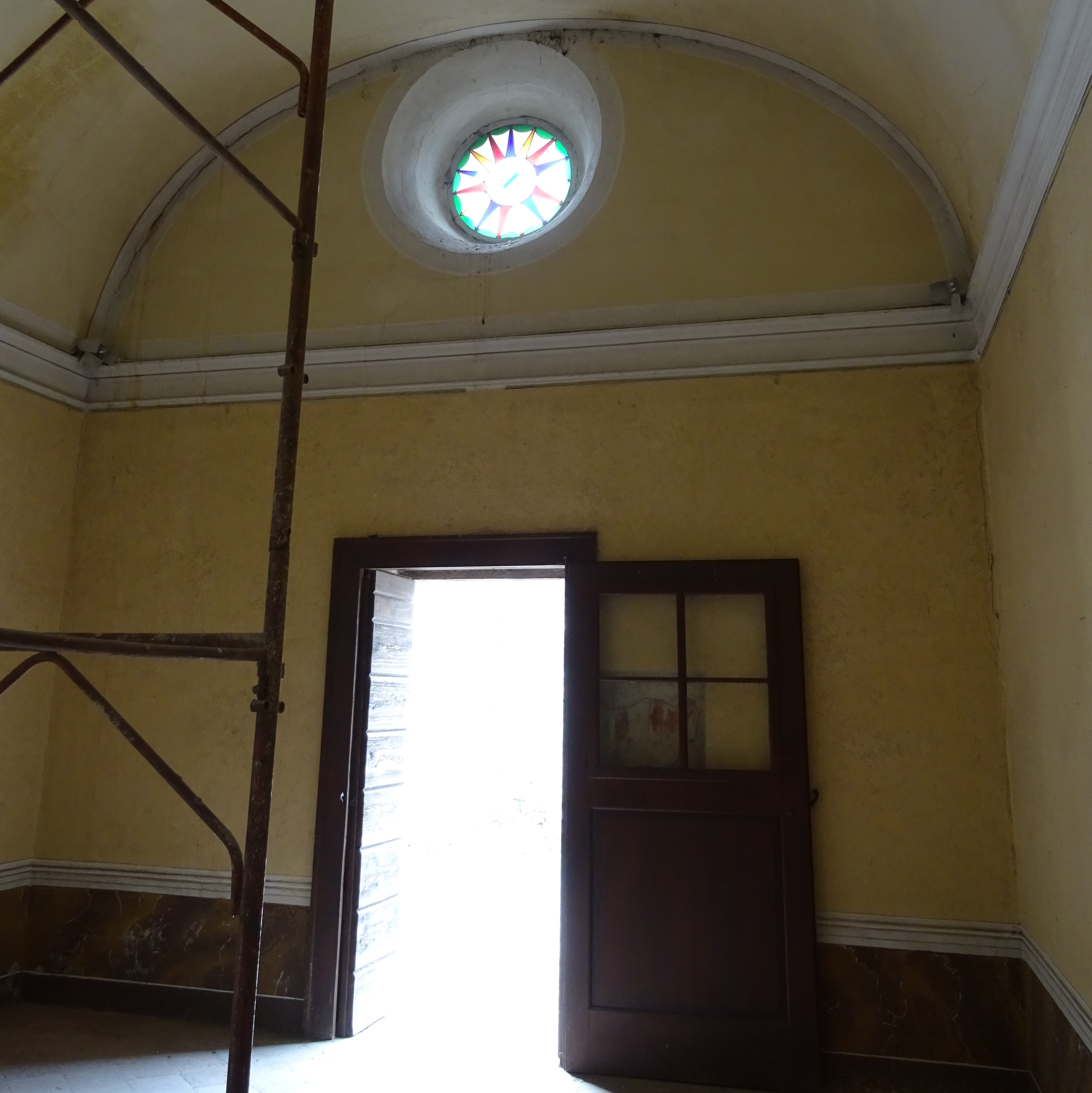 Santa Giulia cazzago San Martino_prospetto interno della chiesa